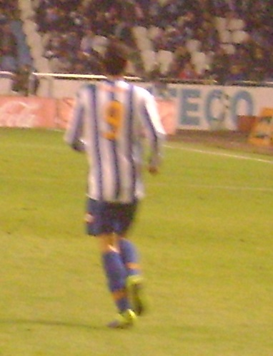 Borja Bastón